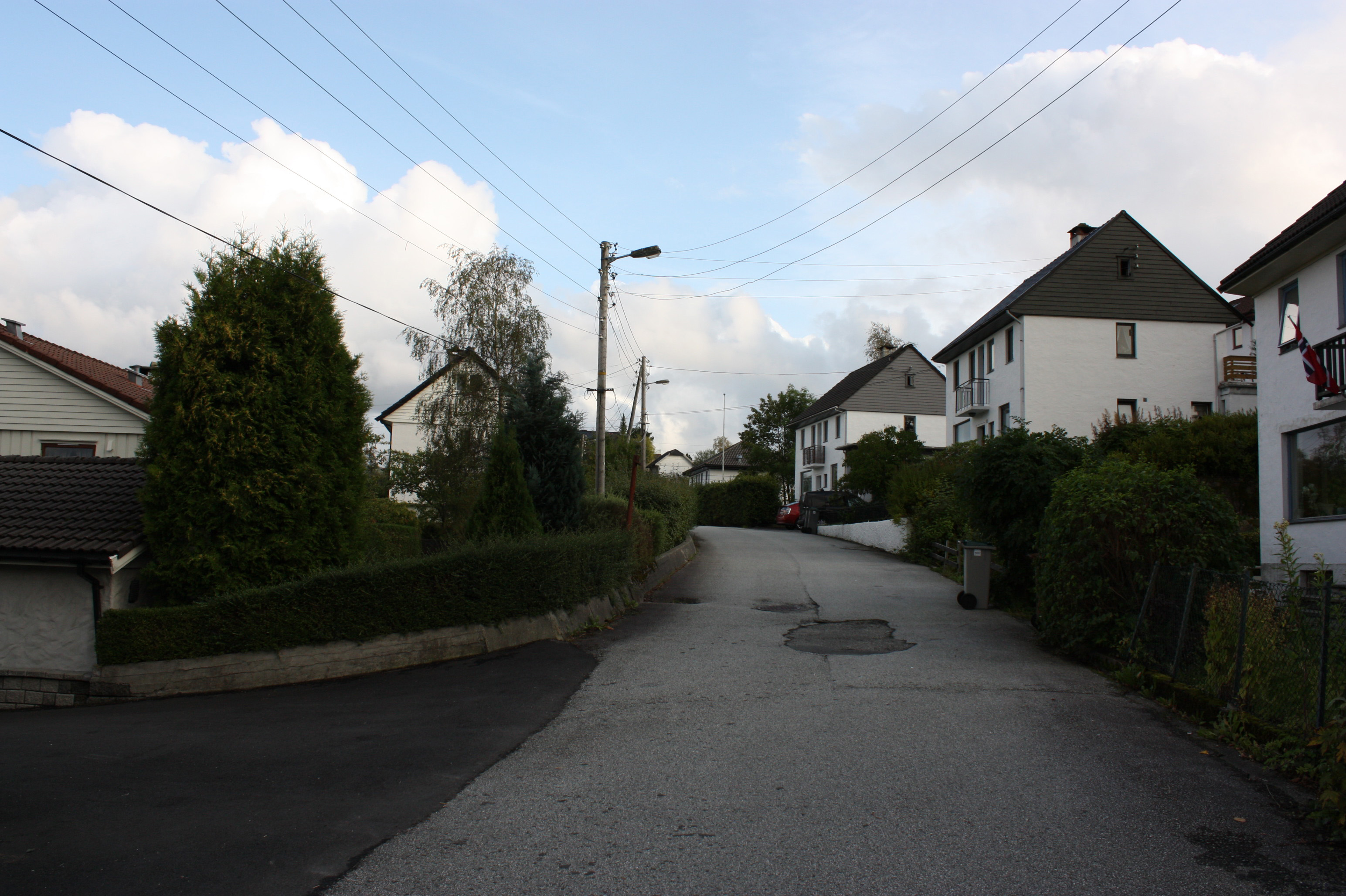 Ankervegen, Fana, Bergen.